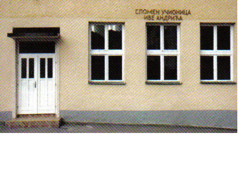 Српски (ћирилица): Зграда основне школе у Вишеграду коју је похађао Андрић